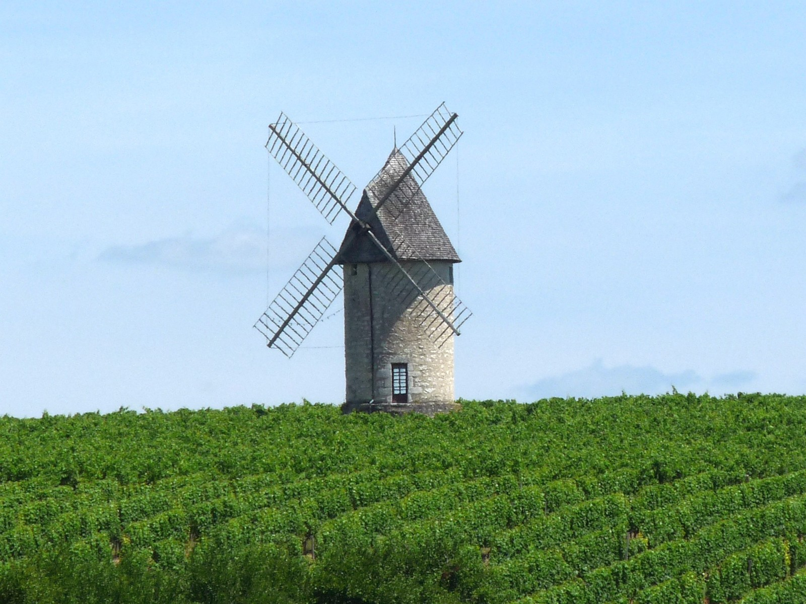 Moulin de Marquet, Villeneuve-de-Duras, Lot-et-Garonne, France